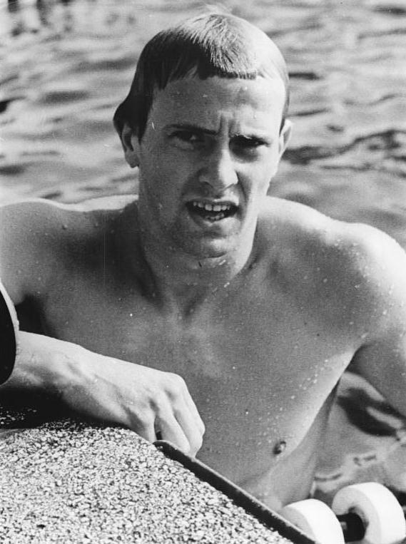 Lutz Unger Zentralbild Liebers 11-7-70-Brandenburg: XXI. DDR-Meisterschaften im Sportschwimmen im neu eröffneten Volksbad von Brandenburg-Havel (am 10.7.70)-Lutz Unger (SC Dynamo Berlin) holte sich in 4:15,9 min über 400 m Freistil bereits seinen zweiten Meistertitel, nachdem er auch über 200 m erfolgreich war. Über 100 m Freistil konnte er Vizemeister werden.